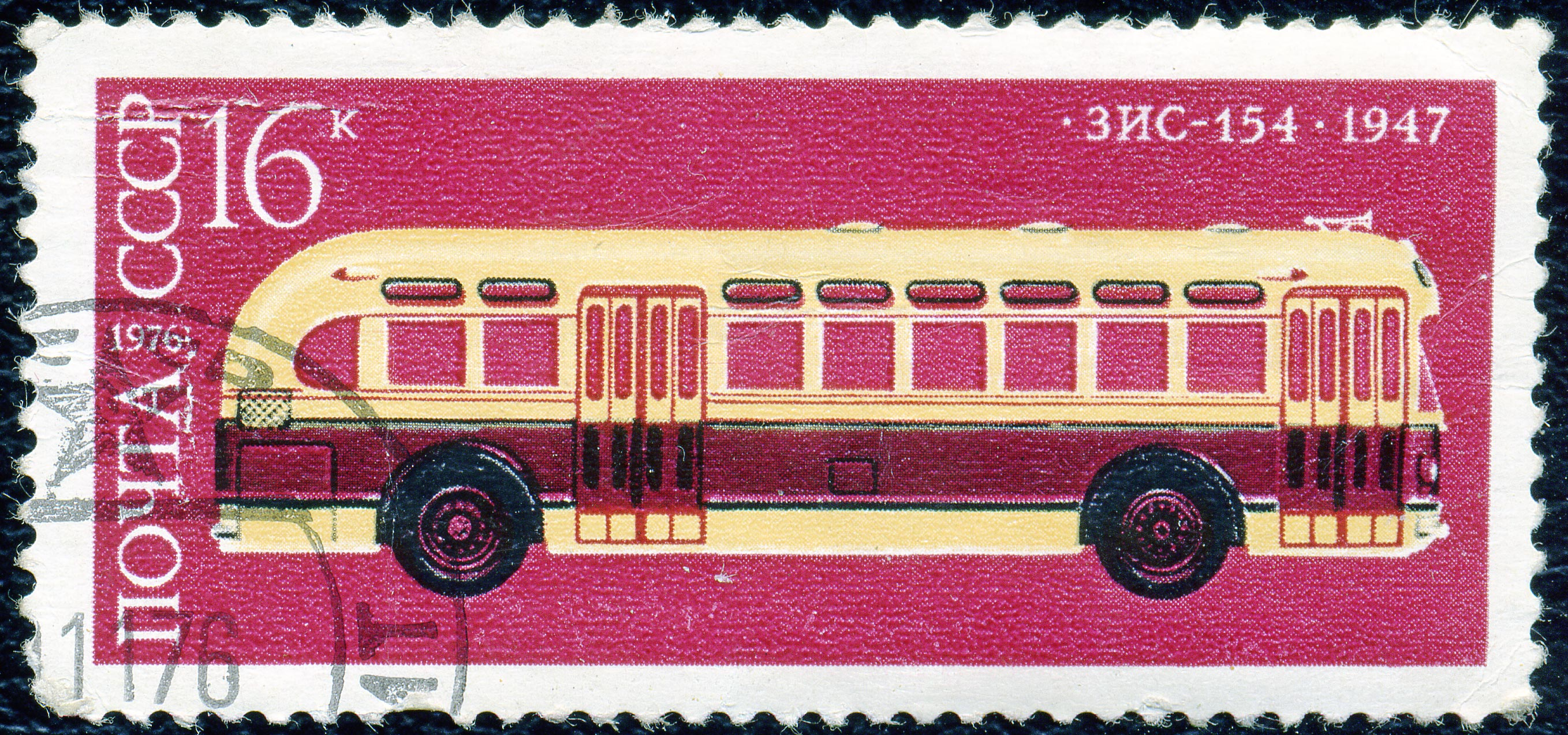 Почтовая марка СССР. 1976. Зис-154